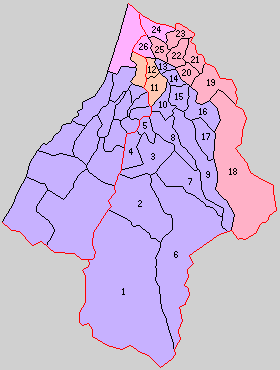 山形県東田川郡の町村。